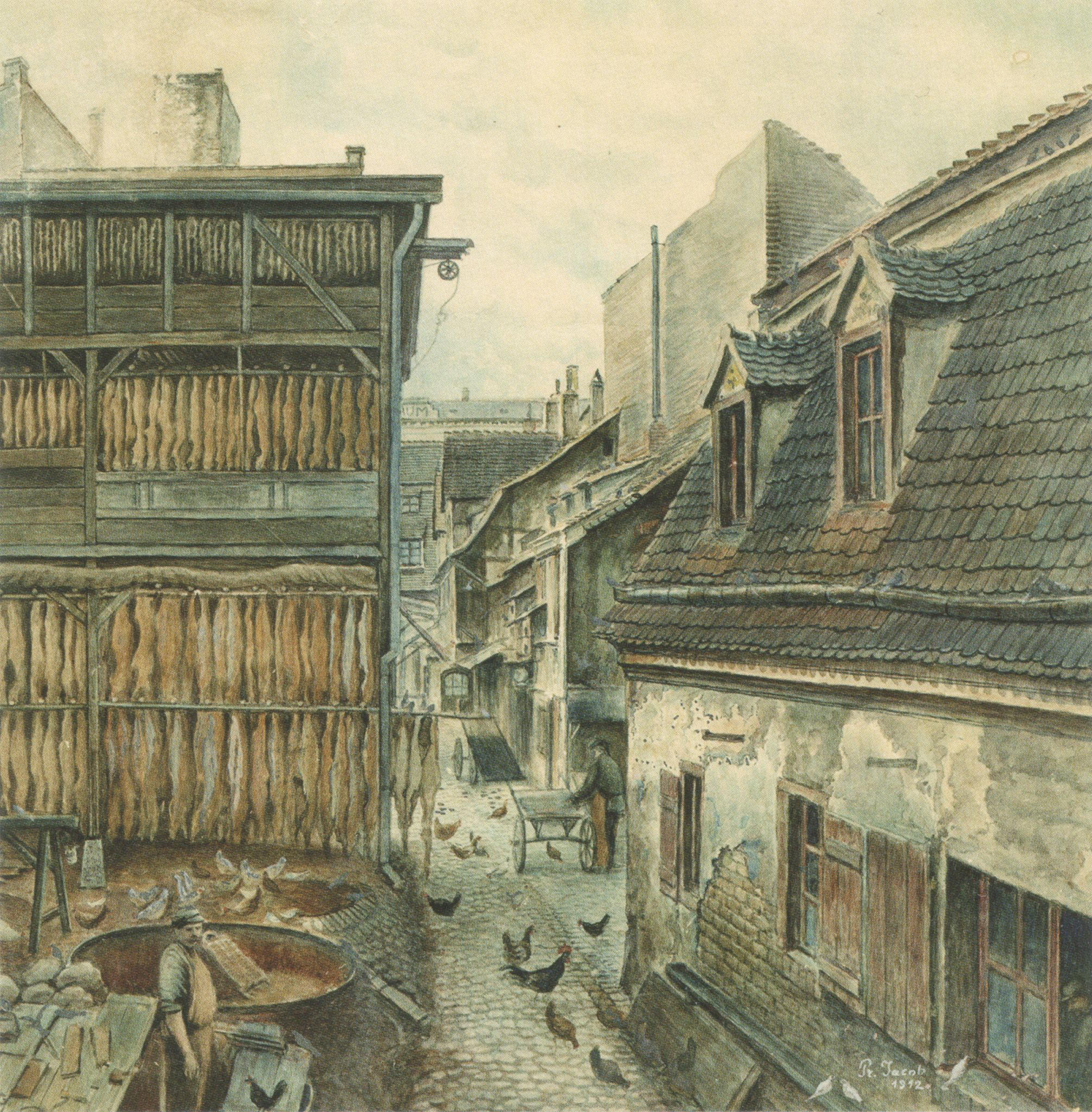 Aquarell von Jacob Peter (Leipzig, 1912): Lohgerberei Naumann in der Gerberstraße. Auf mehrstöckigen Trockenböden aufgehangene Rotfuchsfelle, u. a. Felle (Marder?) im obersten Stockwerk der Gerberei.